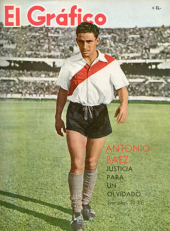 En la tapa de El gráfico, como homenaje a su trayectoria en 1962